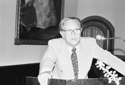 Freiburg im Breisgau: Prof. Dr. Dieter Oberndörfer vom Arnold-Bergstraesser-Institut e.V. beim Festakt zum 40-jährigen Bestehen des Ausländerbeirates der Bundesrepublik